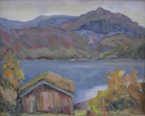 Norwegian: Ved Nedre Sjodalsvatntitle QS:P1476,no:"Ved Nedre Sjodalsvatn" label QS:Lno,"Ved Nedre Sjodalsvatn"